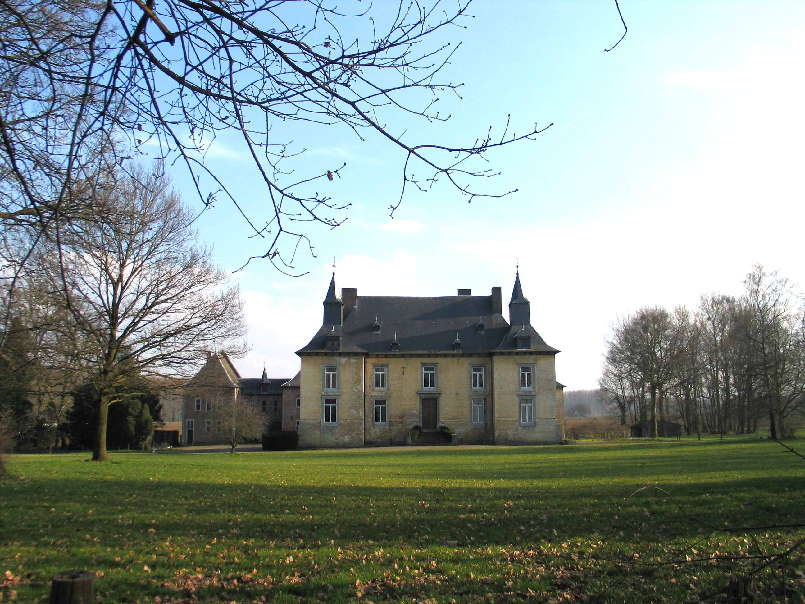 Kasteel van Schalkhoven in Schalkhoven, België